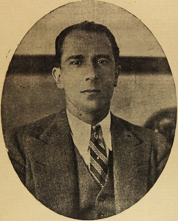 Eugenio Matte Hurtado (Santiago, 6 de diciembre de 1895 - 11 de enero de 1934) fue un abogado y político chileno, Gran Maestro de la Gran Logia de Chile y uno de los fundadores del Partido Socialista de ese país.